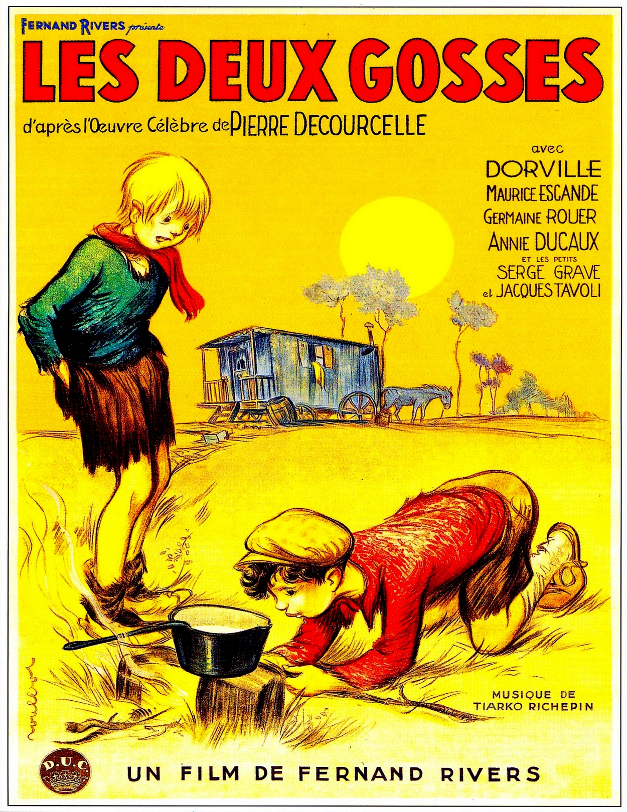 Affiche pour le film Les Deux Gosses de Fernand Rivers (1936), auteur Francisque Poulbot.